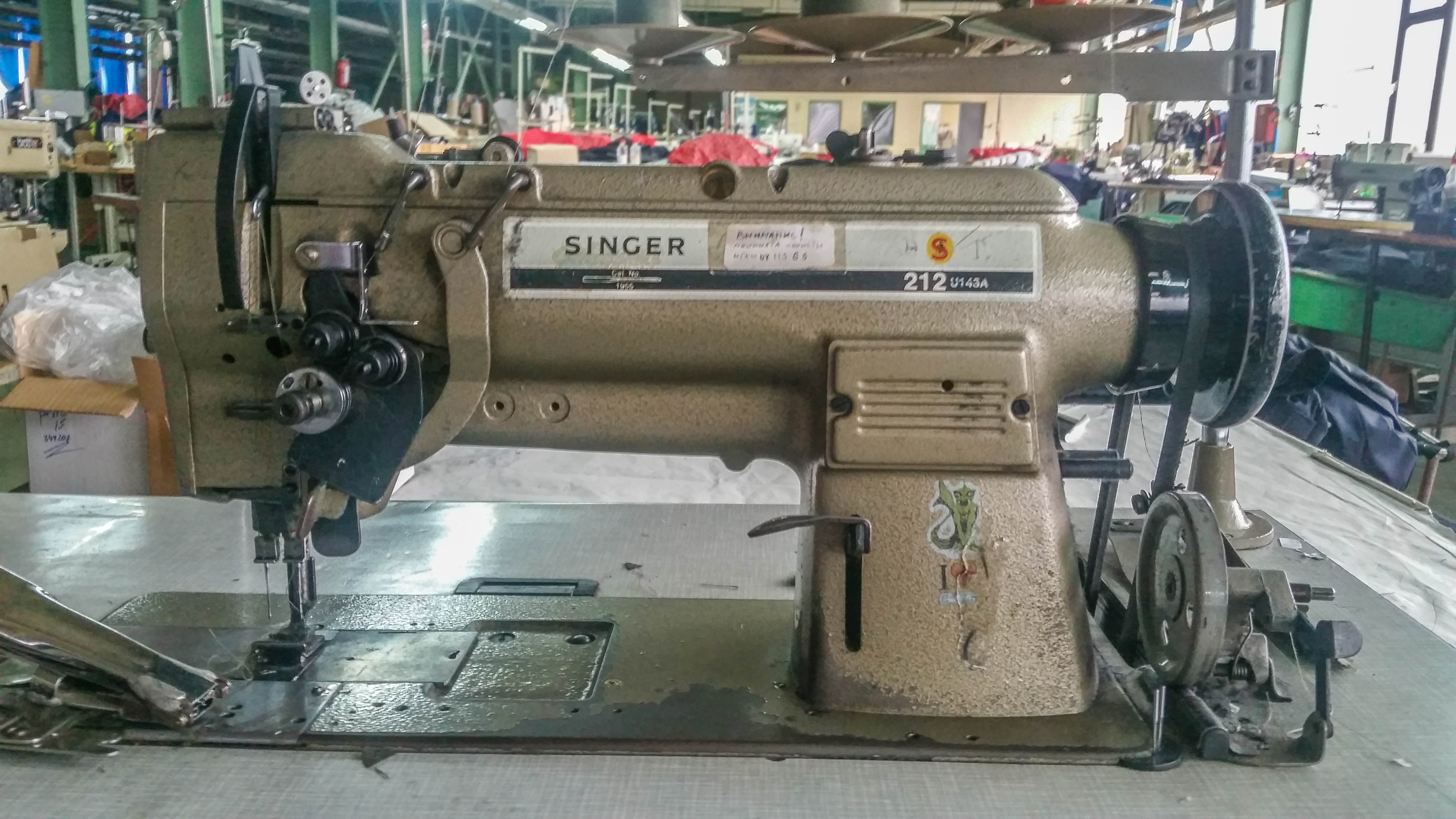 Индустриска машина за шиење Singer